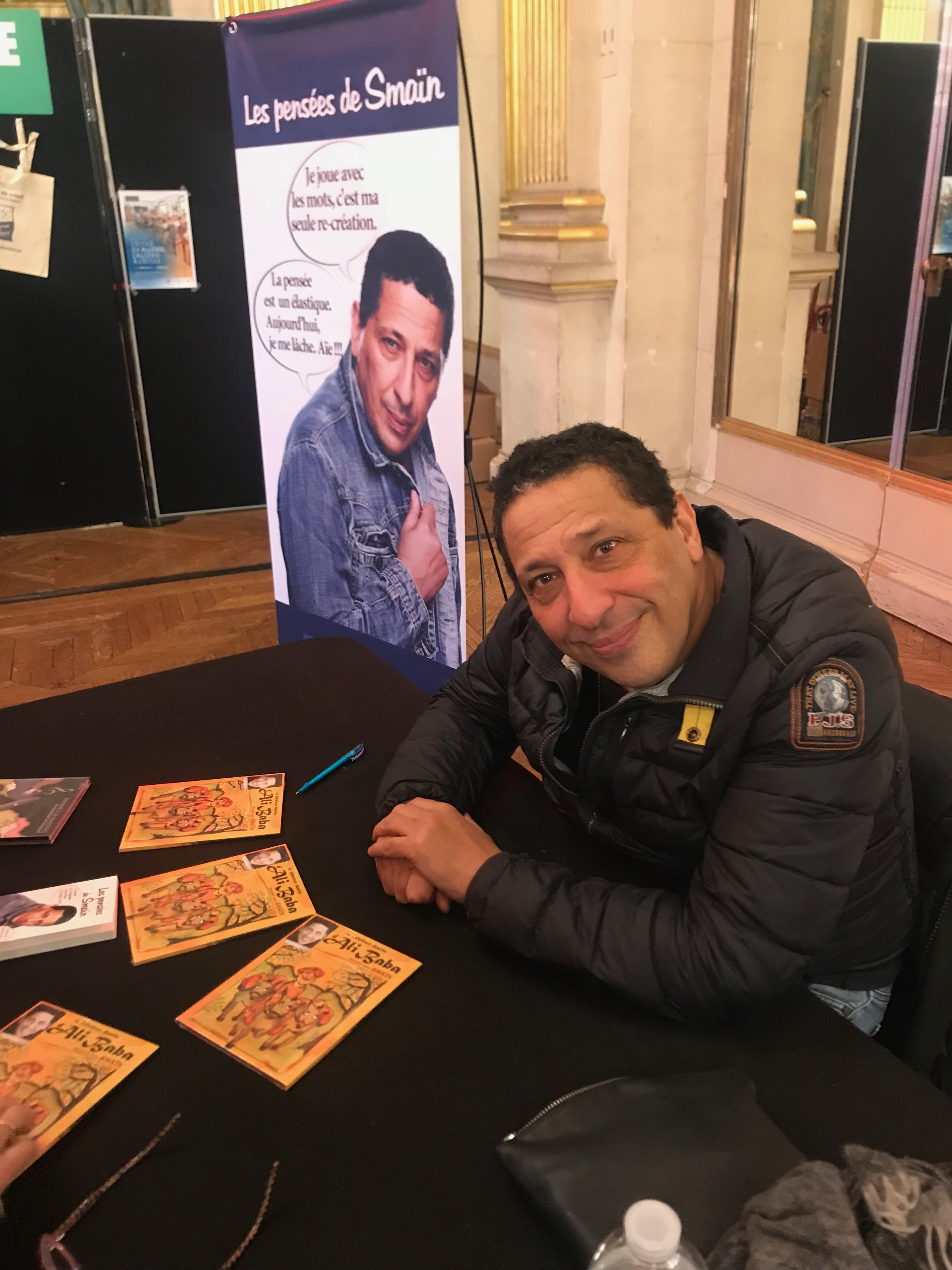 Smaïn, Maghreb-Orient des Livres, Paris, février 2018.